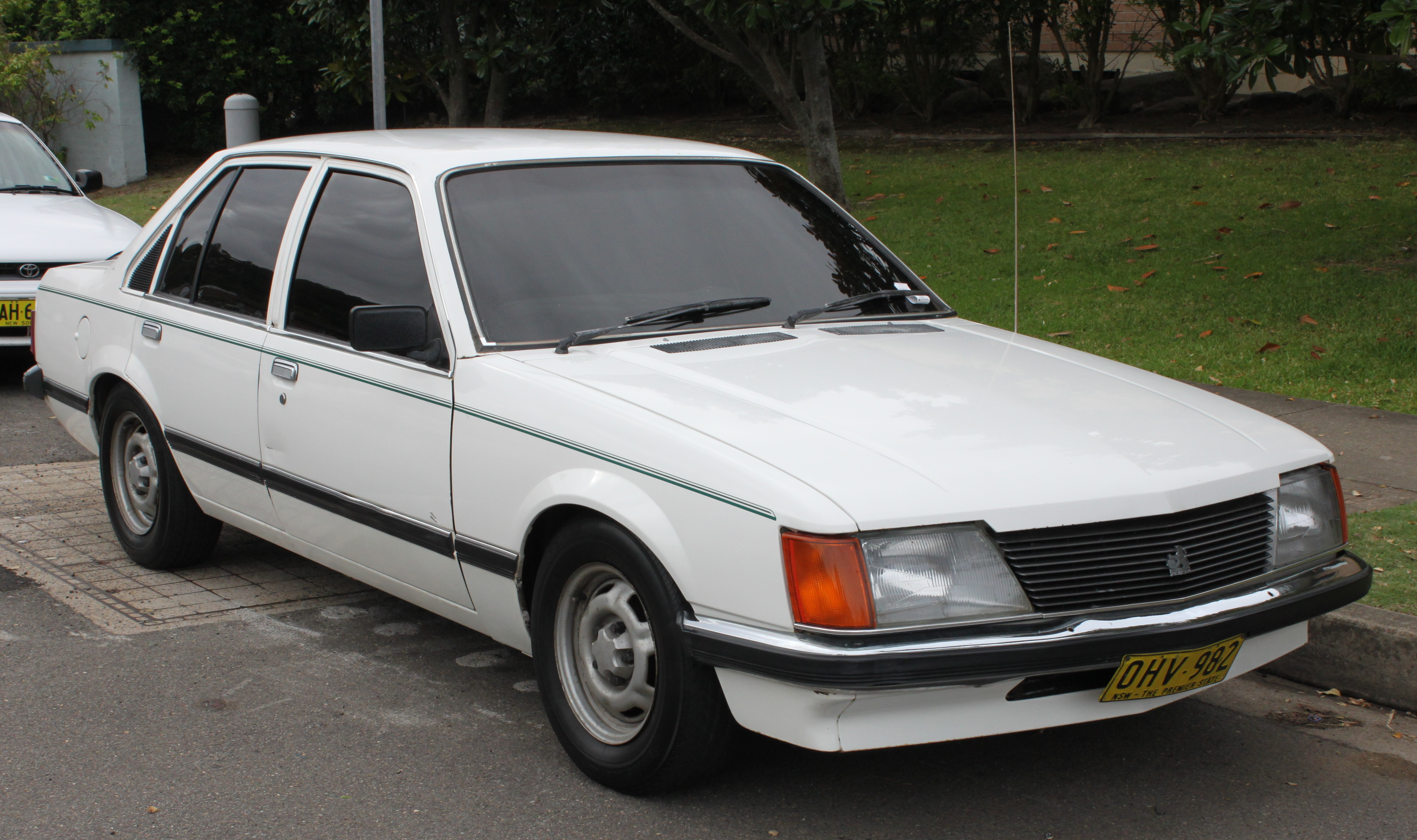 Holden Commodore VH SL